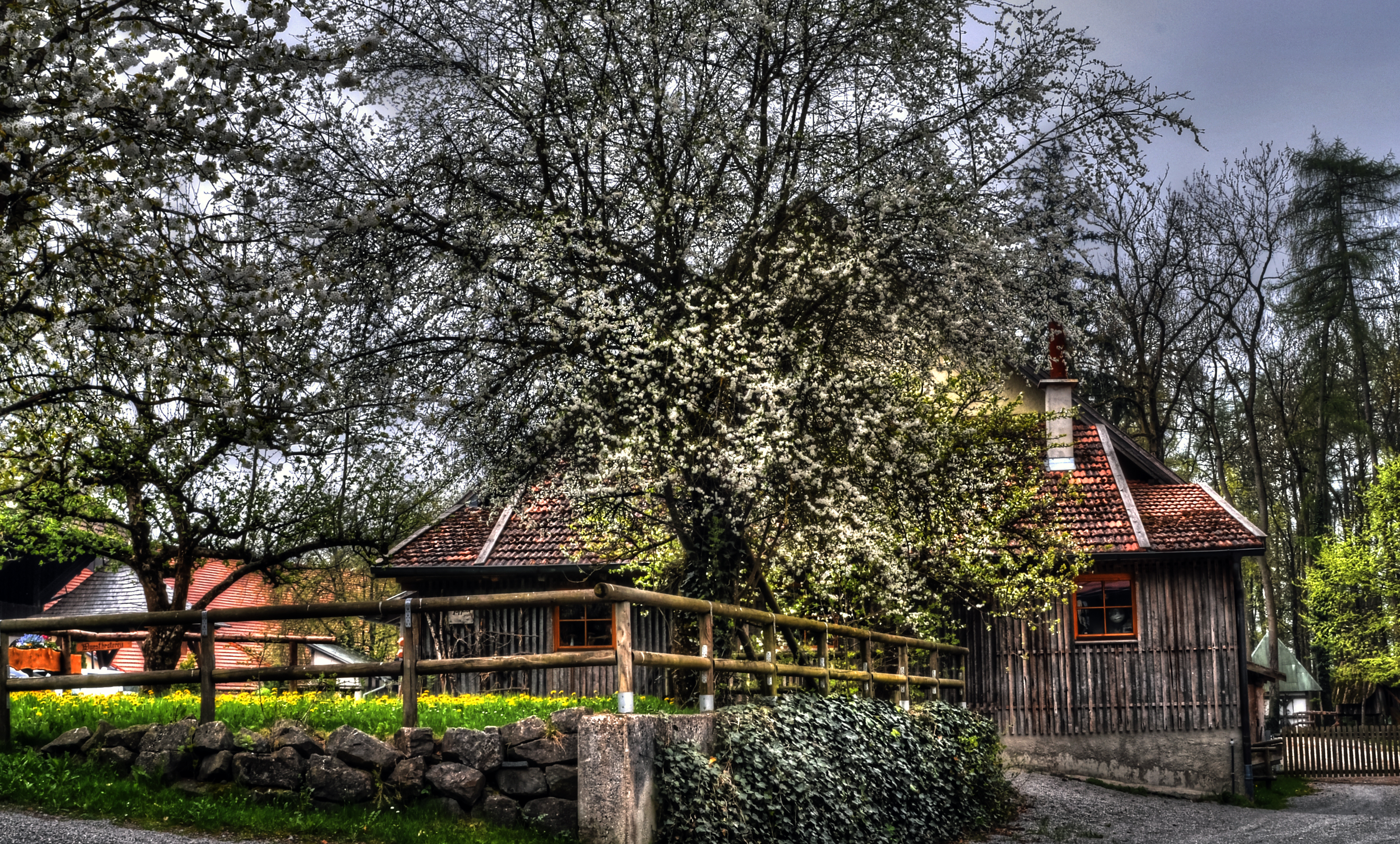 Das durch den Herzog von Oberbayern und Pfalzgraf bei Rhein Rudolf I 1292 gebaute Schloss ist heute im Besitz von Luitpold Prinz von Bayern. Der wiederum ist der Urenkel des letzten Bayrischen Königs Ludwig III und bewohnt das Schloss. Das Schloss ist nicht nur Schauplatz der alljährig stattfindenden "Kaltenberger Ritterspiele" sonder auch wegen des hervorragenden Weißbieres, das in der schlosseigene "König Ludwig Schloss Brauerei" hergestellt wird, über die Landesgrenzen hinaus bekannt. Built by the Duke of Bavaria and Count Palatine of Rhine Rudolph I 1292, the castle is now owned by Prinz Luitpold of Bavaria. He is the great-grandson of the last Bavarian king Ludwig III and inhabited the castle. The castle is not only the scene of the each year held "Kaltenberger Ritterspiele". It is also known because of the excellent white beer that is manufactured in the castle's own "King Ludwig's Castle Brewery".